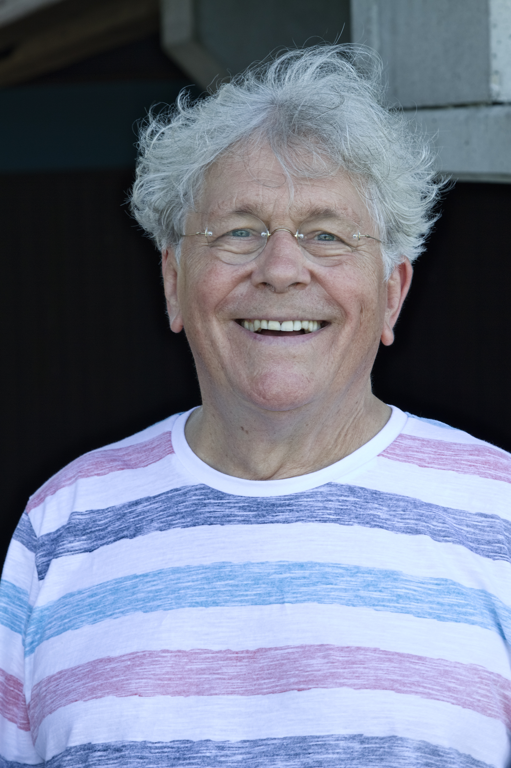 Der Schauspieler und Sprecher Tommi Piper bei einem Fotoshooting an der Regattastrecke Oberschleißheim bei München.